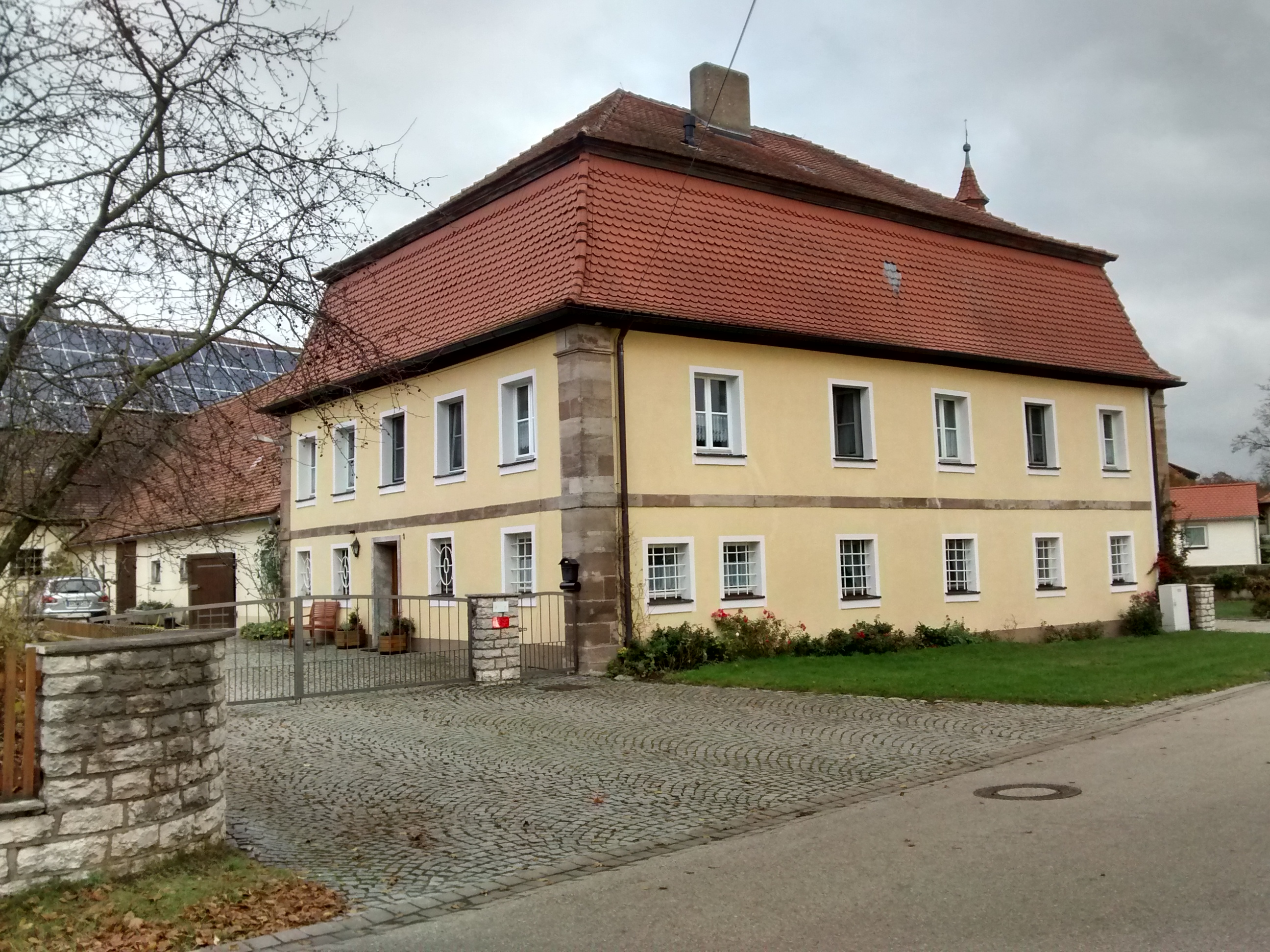 Schloss Forst